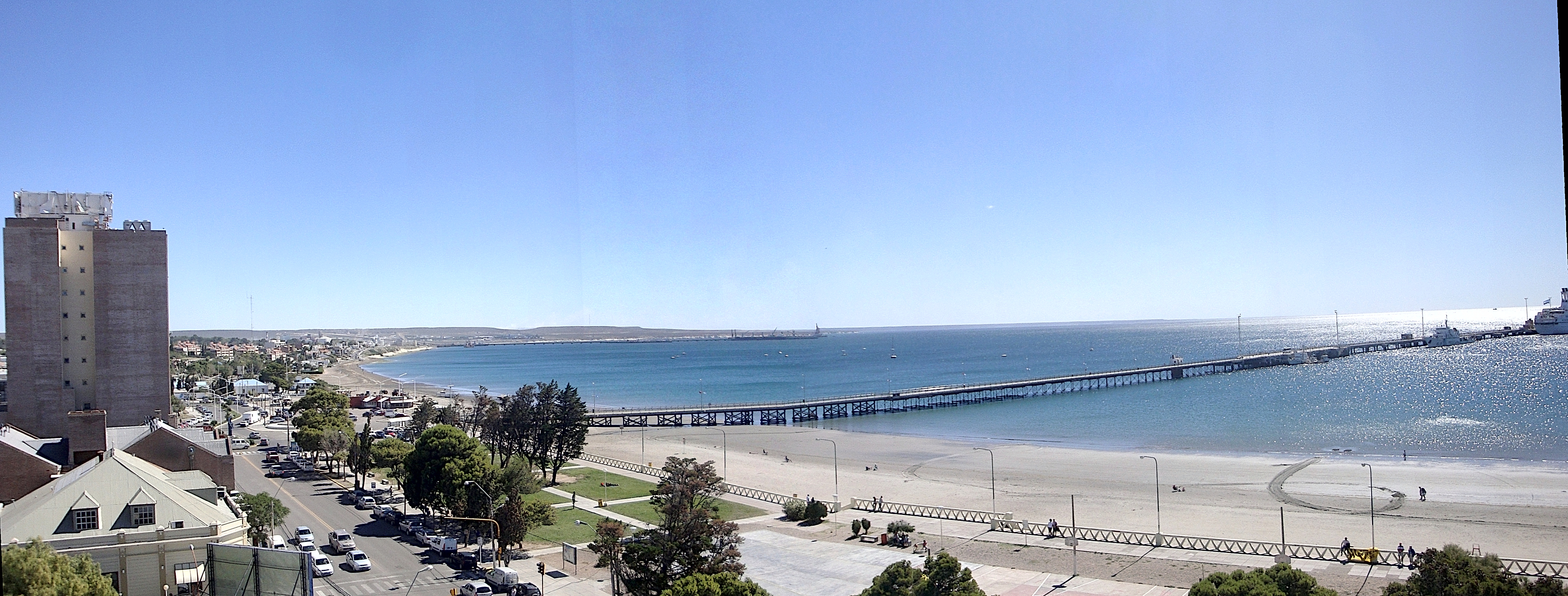 Vista parcial de la ciudad de Puerto Madryn, Chubut, Argentina.